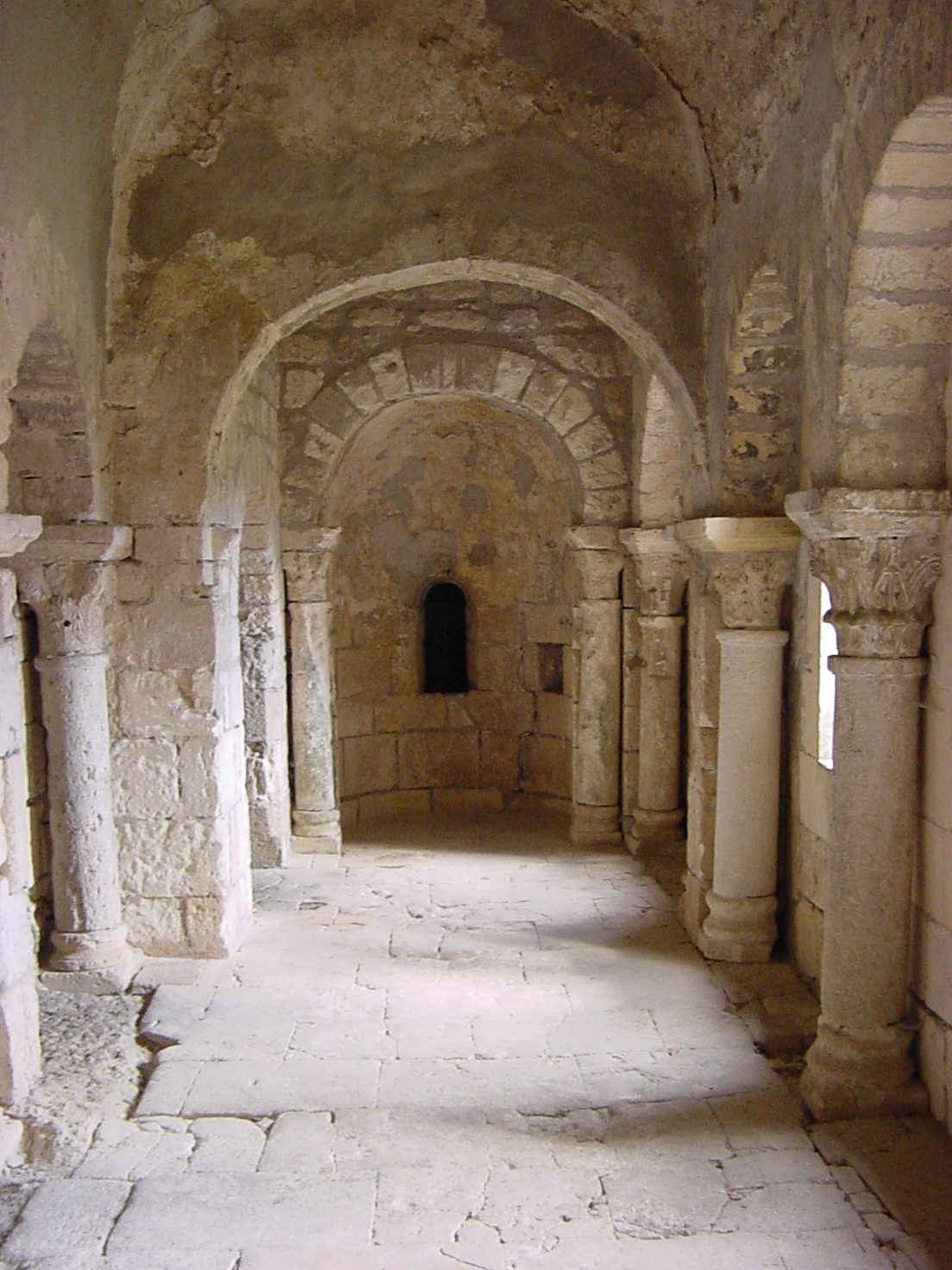 Près d'Arles, dans le département des Bouches-du-Rhône en France, sur le site de l'abbaye de Montmajour, l'Ermitage Saint-Pierre.